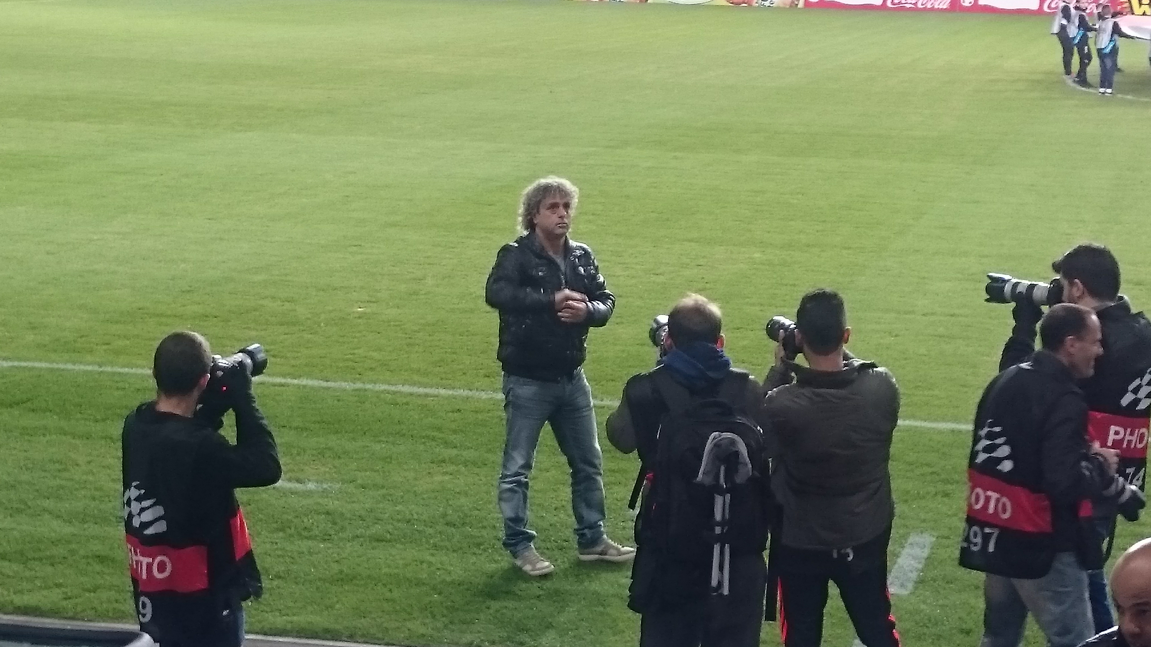 ראובן עטר - מאמן מכבי נתניה